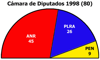 Cámara de Diputados año 98